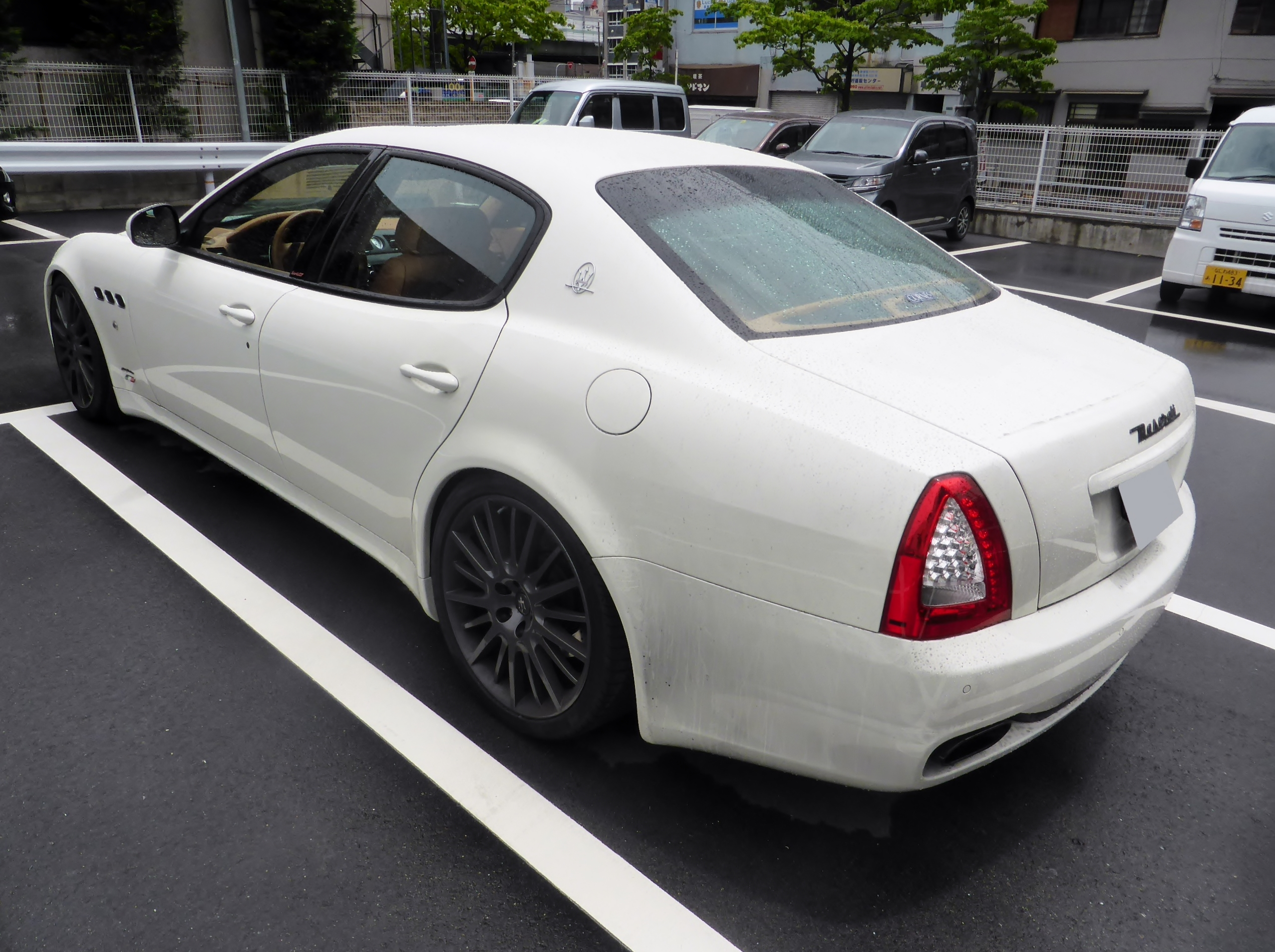 5代目マセラティ・クアトロポルテGTSをリアから撮影。